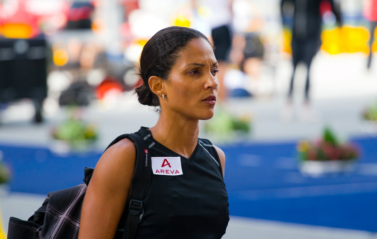 Christine Arron 100m aktuelle Europarekordhalterin